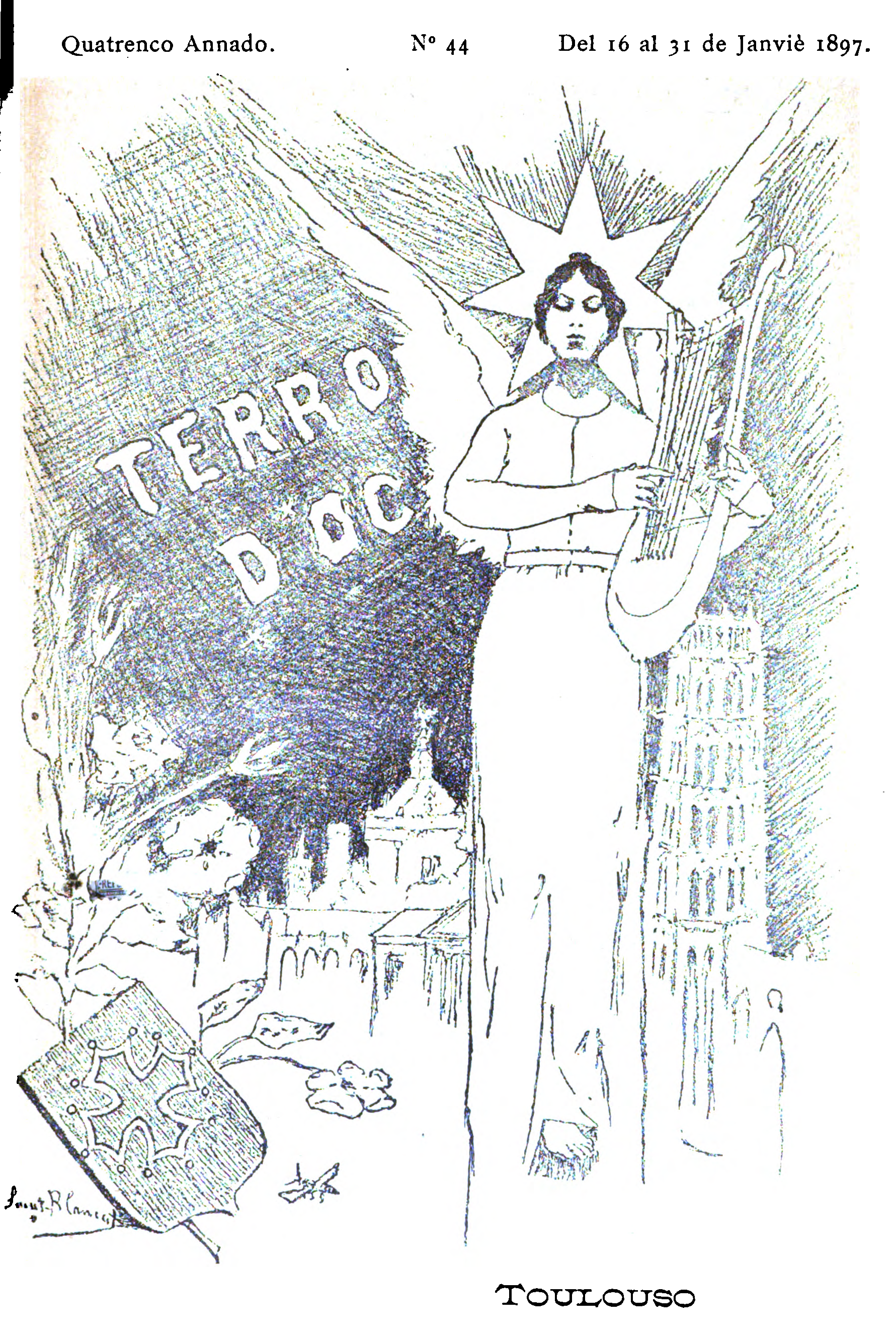 Couverture de la revue La Terro d'Oc n°44 (1897)